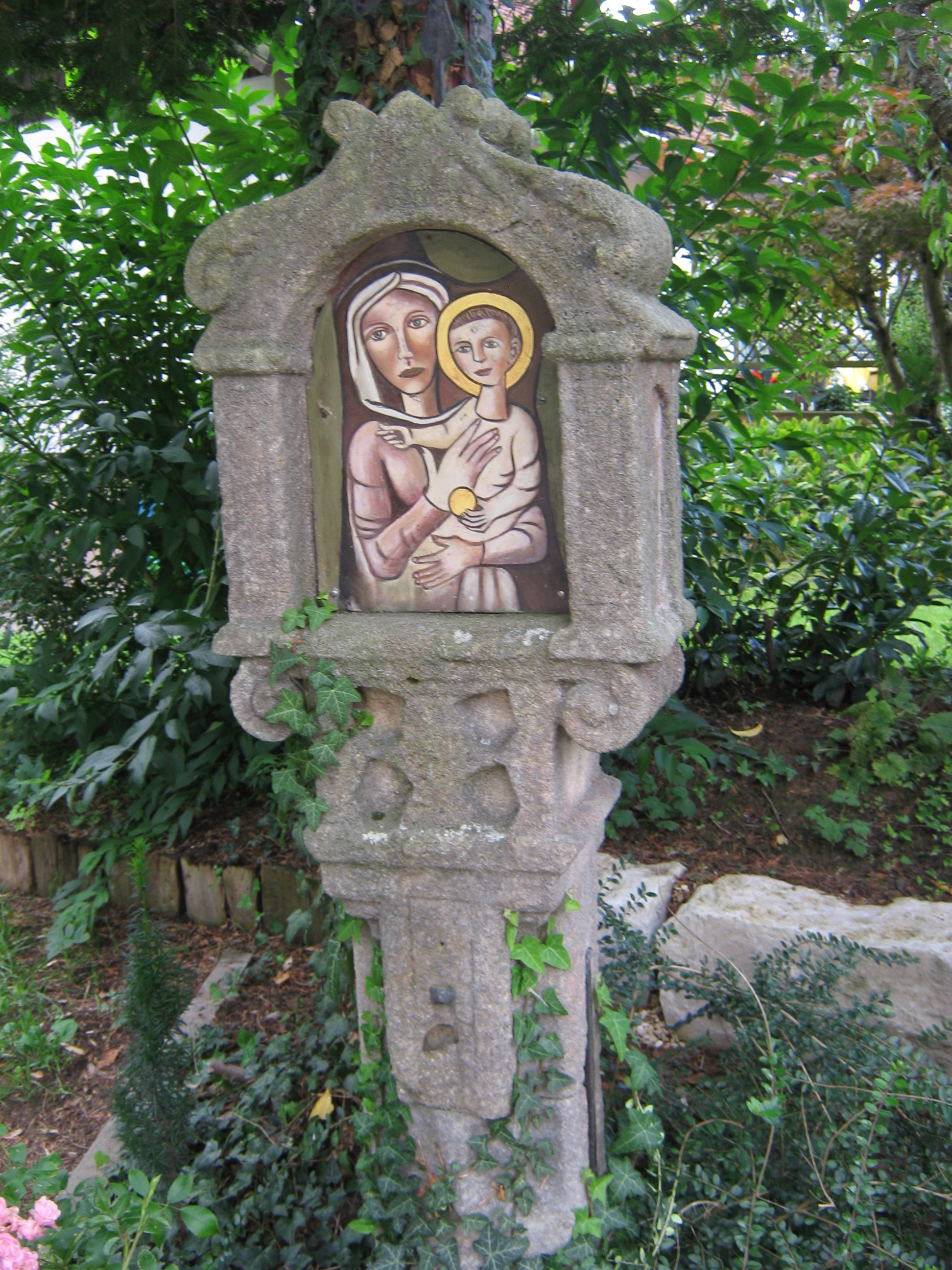 Bildstock im Weggental auf halbem Weg zwischen Rottenburg am Neckar und Weggentalkirche (Wallfahrtskirche zur Schmerzhaften Mutter Gottes)